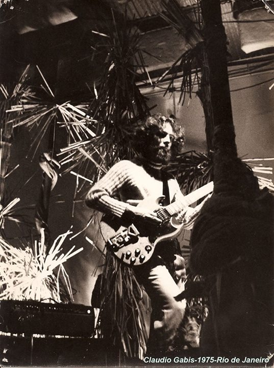 Claudio Gabis actuando en el debut de Ney Matogrosso en el Teatro Nacional de Río de Janeiro (1975).